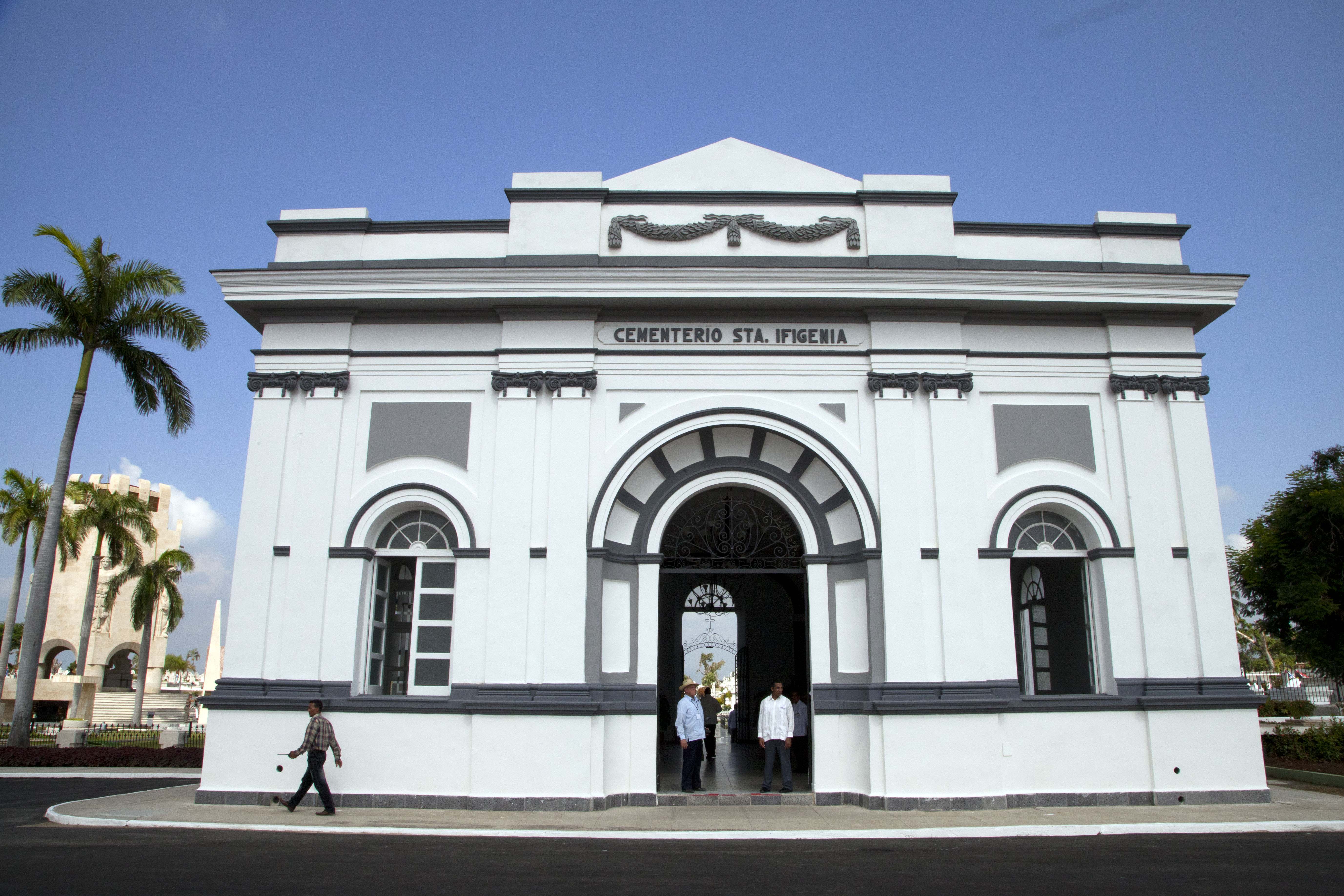 Santiago de Cuba (Cuba), 26 de julio de 2013. En el cementerio Santa Ifigenia mandatarios y autoridades colocaron una ofrenda floral en el panteón que guarda los restos de José Martí, héroe nacional de Cuba. Foto: Fernanda LeMarie - Cancillería del Ecuador.